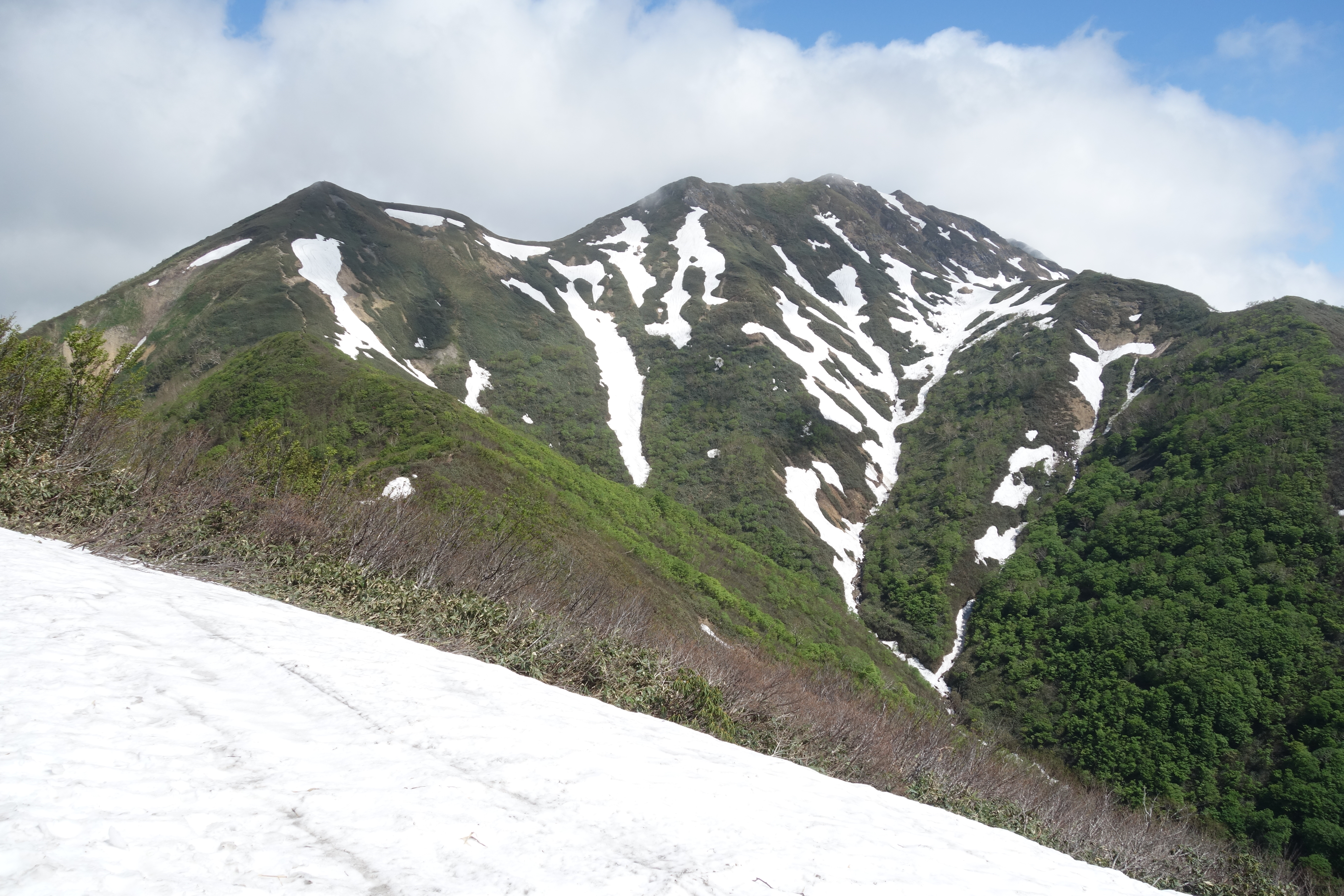 白毛門方面から見た笠ヶ岳